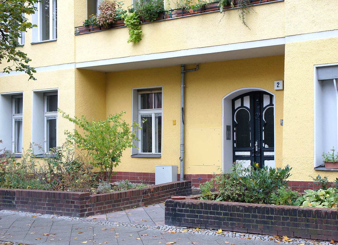 In diesem Wohnhaus in der Auguste-Viktoria-Straße 2, Berlin-Schmargendorf, wohnte Angelika Schrobsdorff nach ihrer Rückkehr aus Israel von 2006 bis zu ihrem Tod 2016